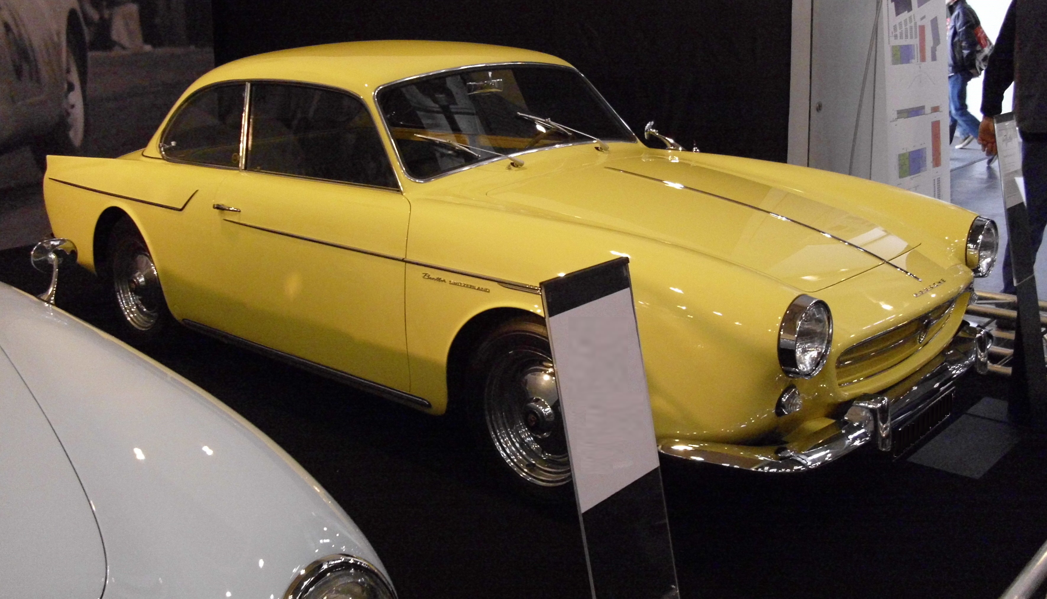 Porsche Coupé von Beutler 1957